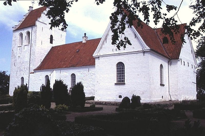 Åstrup Kirke (Faaborg-Midtfyn Kommune) i Danmark. Åstrup kirke